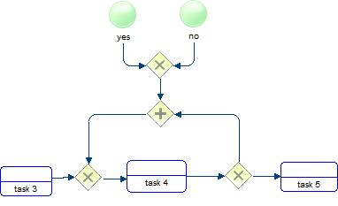 Dobrý cykluc v BPMN 2.0